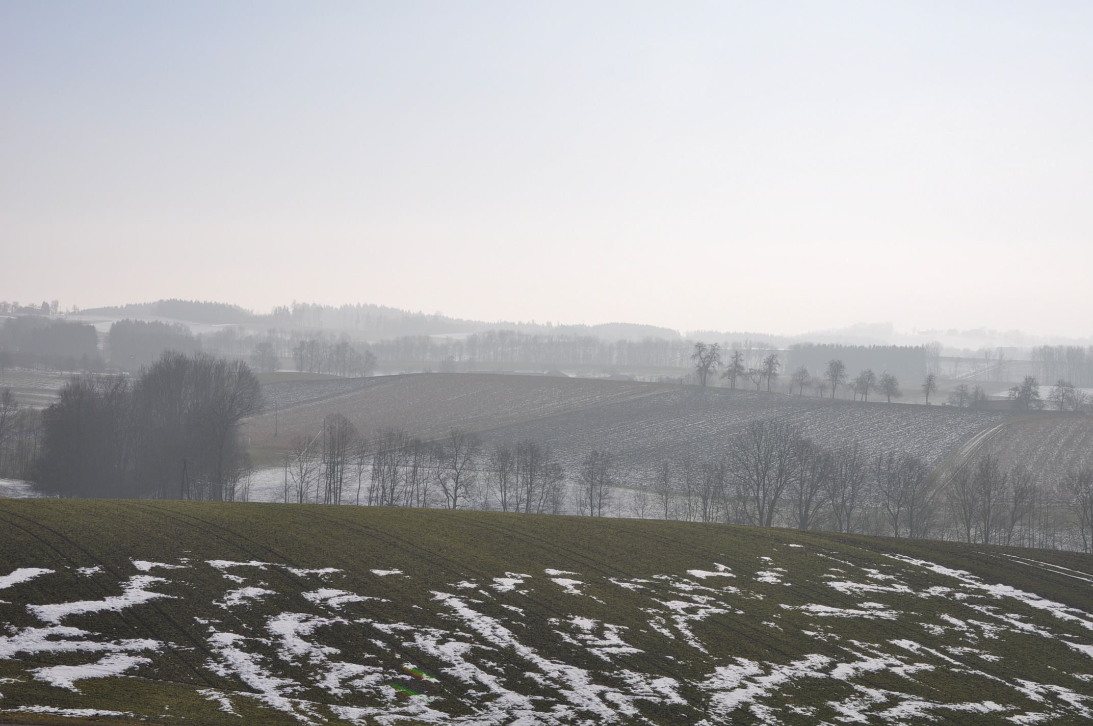 Aufnahme bei Zell an der Pram